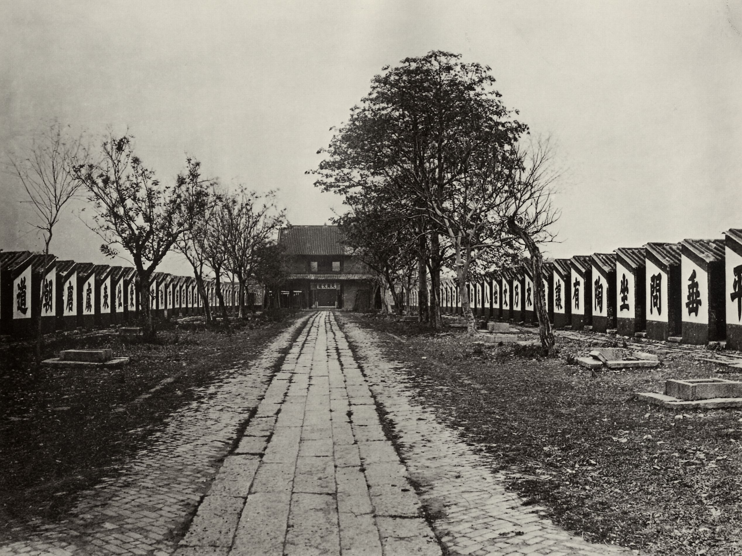 Chinesischer Photograph um 1873: Prüfungshallen, mit 7.500 Zellen, Kanton